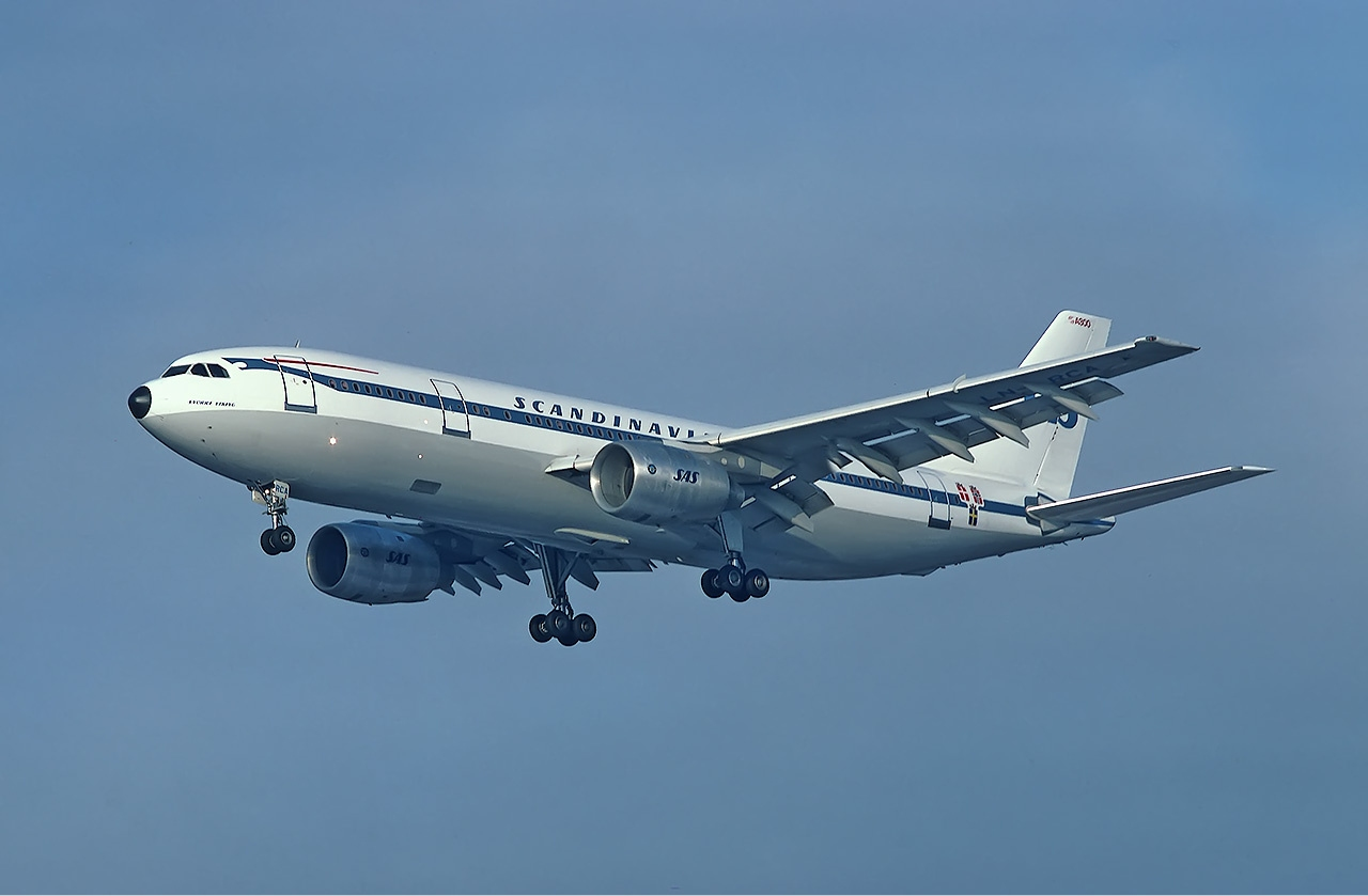 SAS Airbus A300B2-320